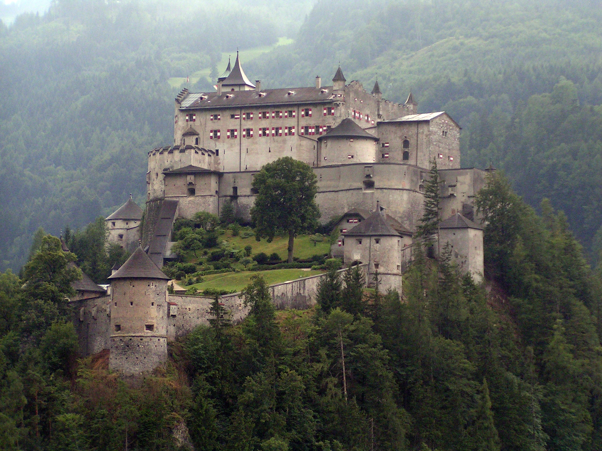 Festung Hohenwerfen near Werfen in Salzburger Land; Austria